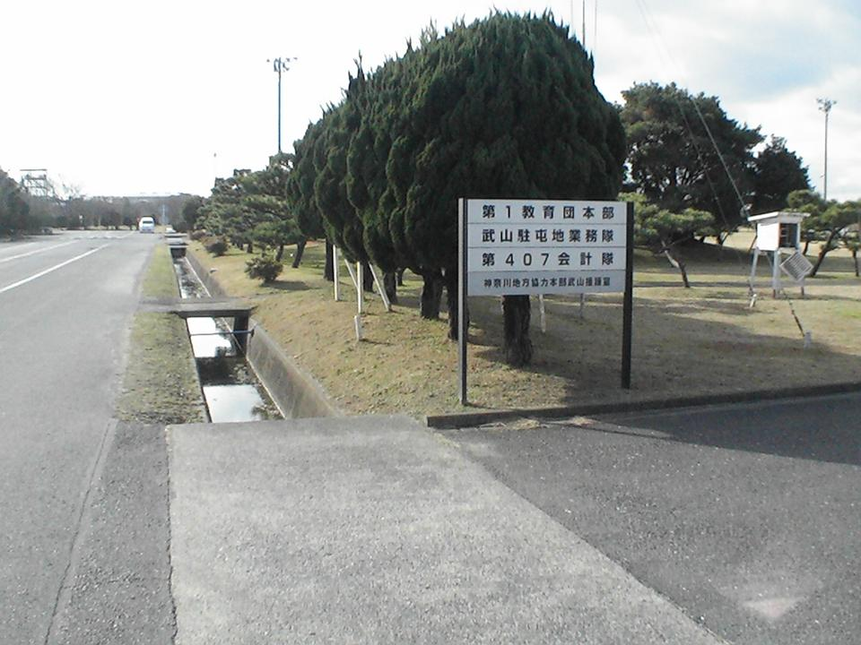 第1教育団創立記念行事当日、投稿者本人が撮影。